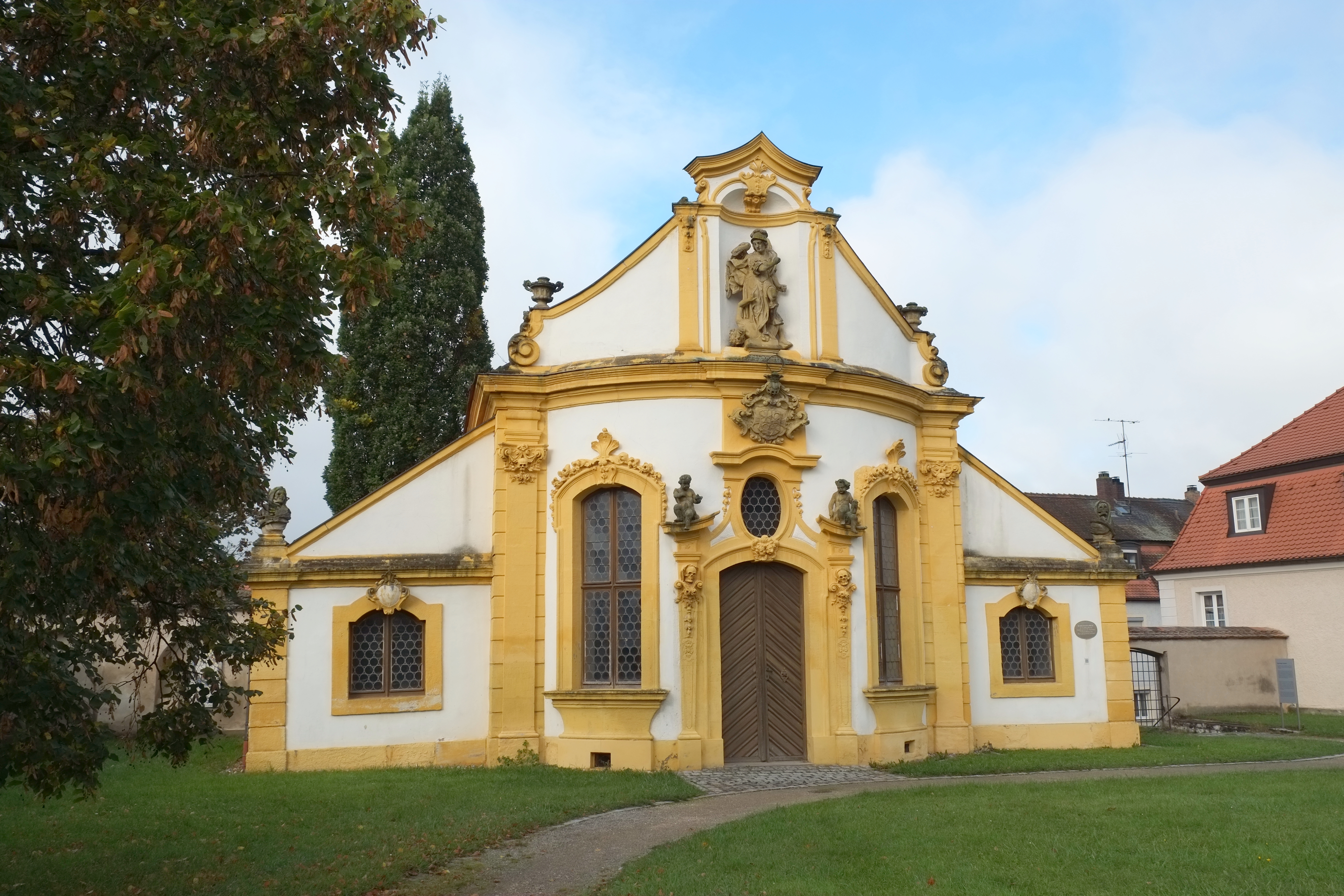 Mariahilfkapelle (Weißenburger Straße, hinter der Kirche St. Georg) in Ellingen im Landkreis Weißenburg-Gunzenhausen (Bayern)